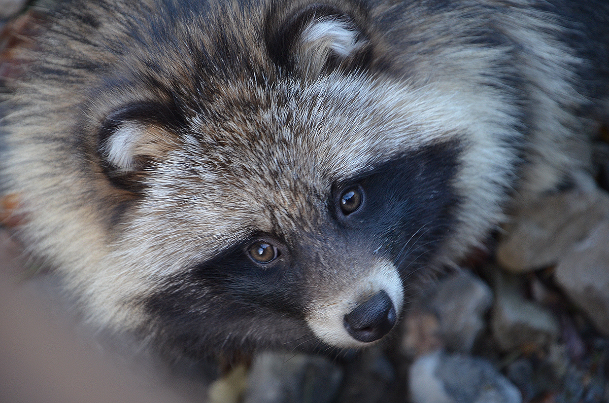 Einer der beiden Marderhunde (auch: Tanuki oder Enok; lateinischer Name Nyctereutes procyonoides), der hier im Wisentgehege in Springe (am Kleinen Deister) offensichtlich auf Futter wartet, ist nicht mit einem Waschbären zu verwechseln ...